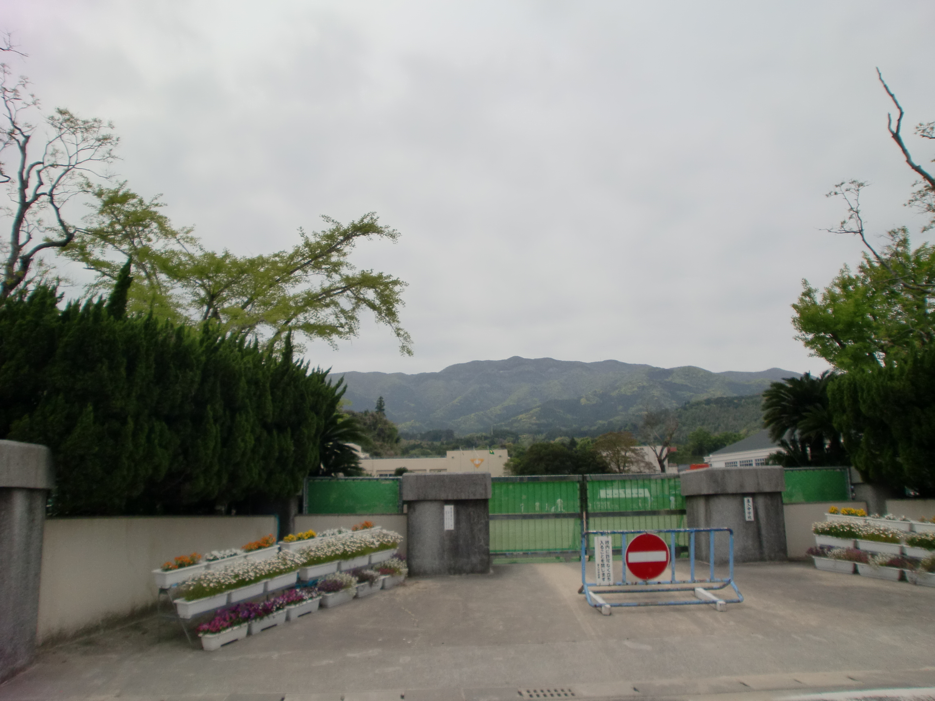 鹿児島市立喜入中学校の外観。